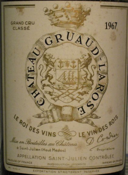 Château Gruaud-Larose 1967 label